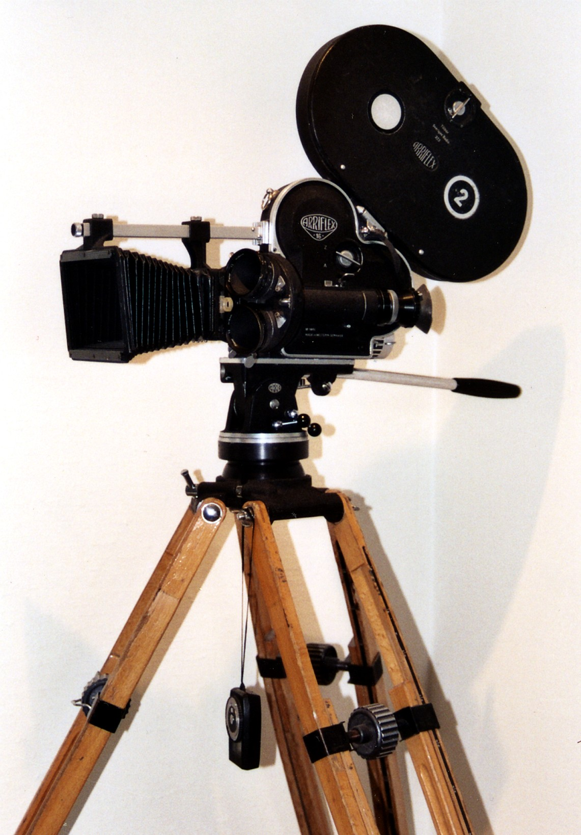 16mm filmkamera Arriflex 16 SR på trästativ